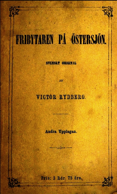 Omslaget till andra upplagan från 1866.